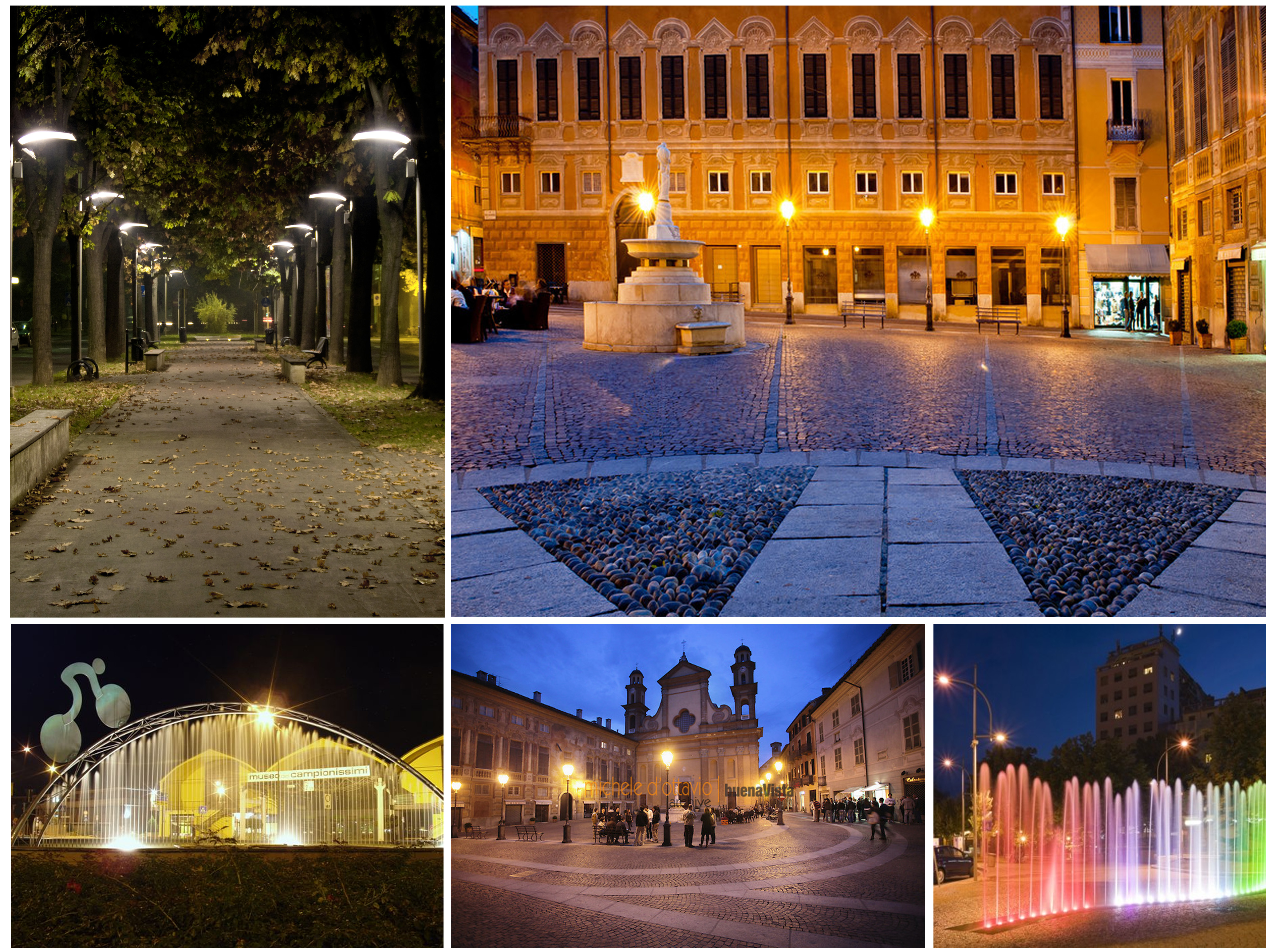 Collage di Novi Ligure